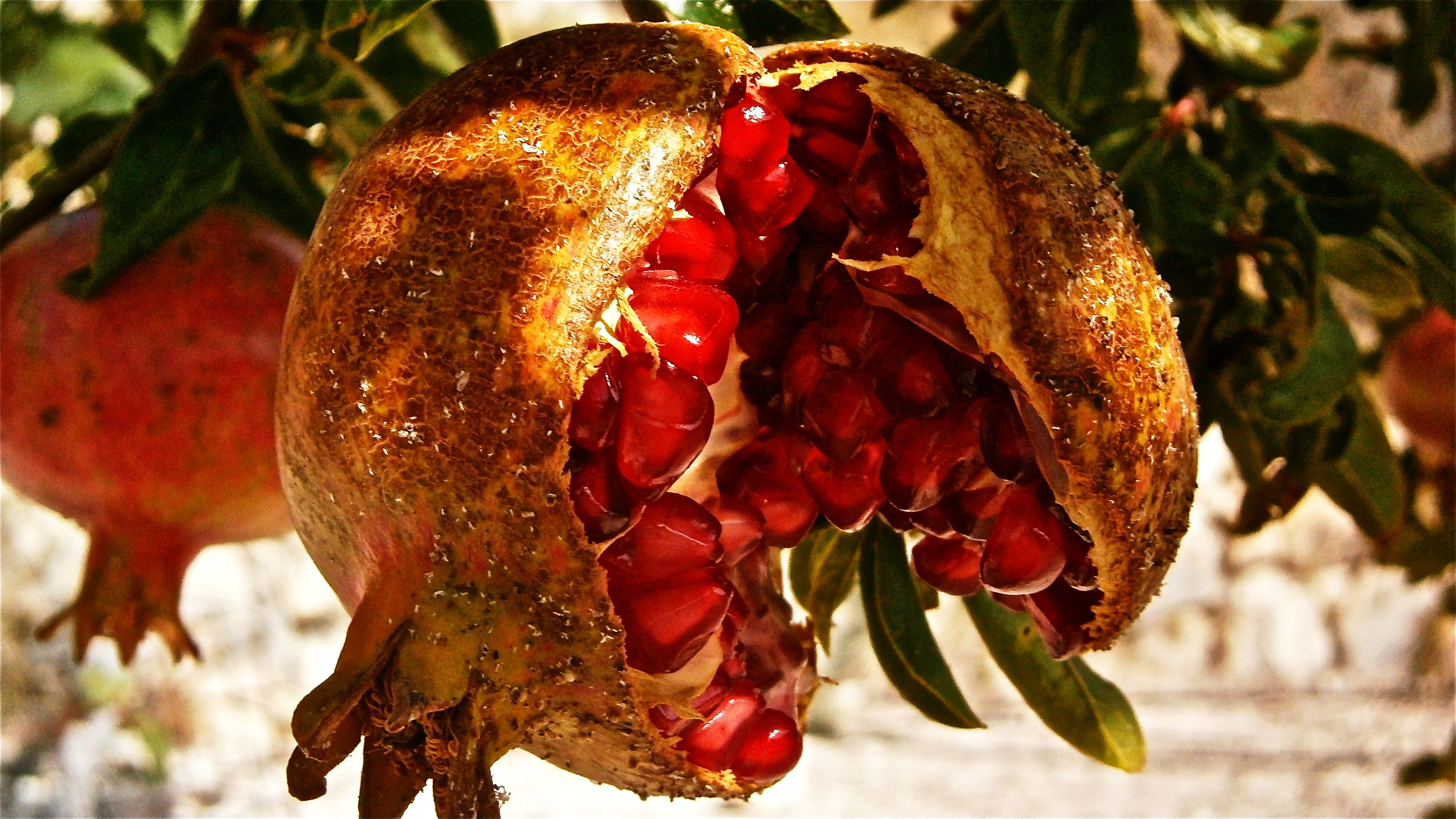 Ces graines sont transportées par zoochorie grâce aux oiseaux.